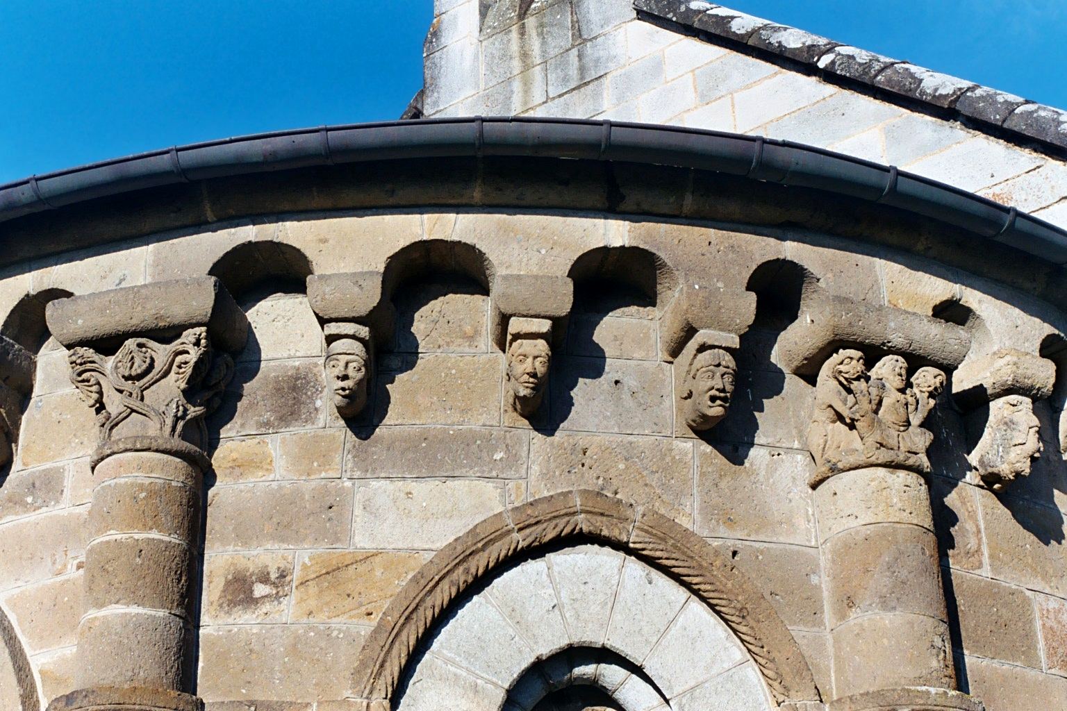 France - Auvergne - Cantal - Église Saint-Georges d'Ydes-Bourg